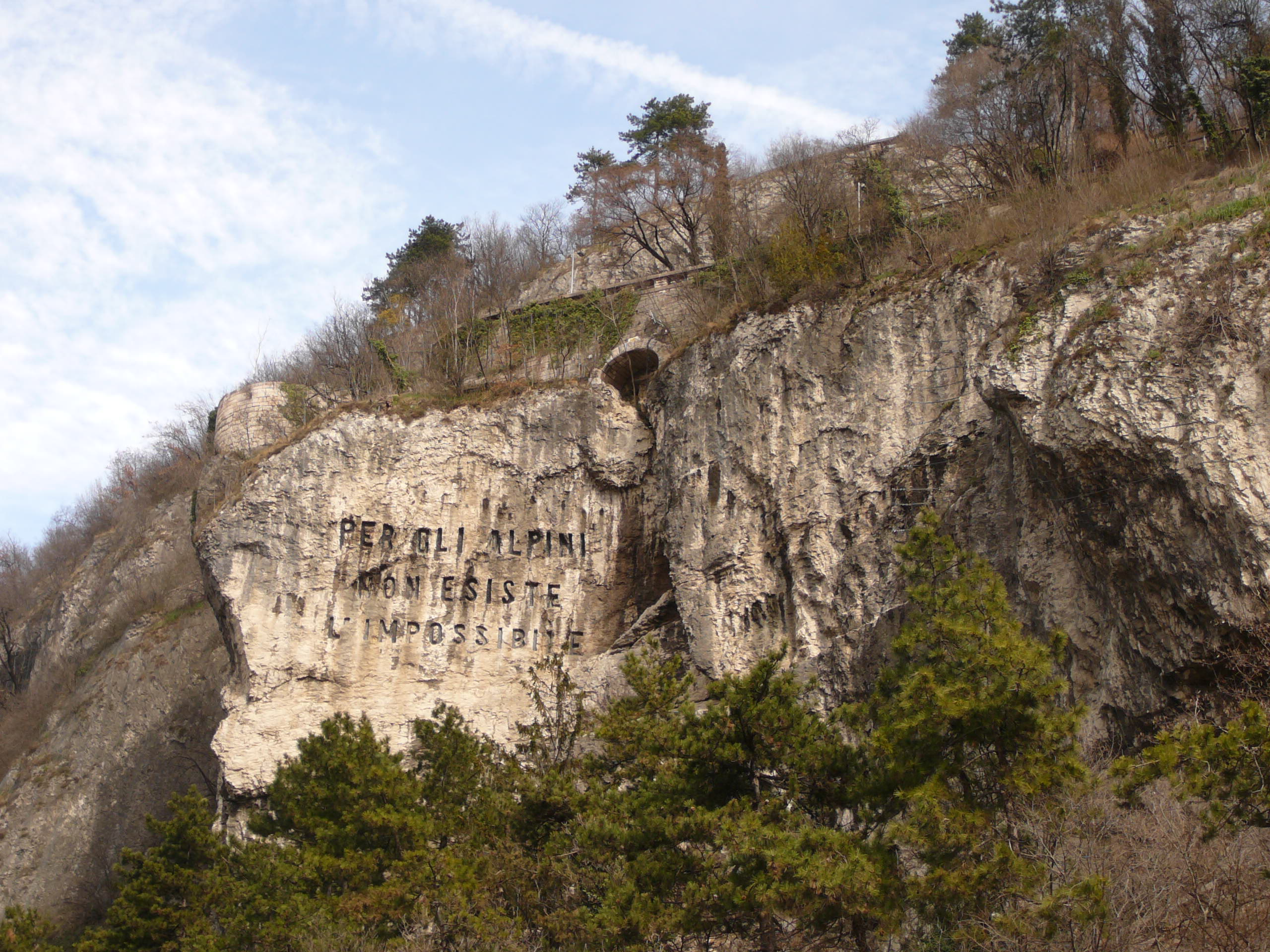 Scritta scolpita sul Doss Trento